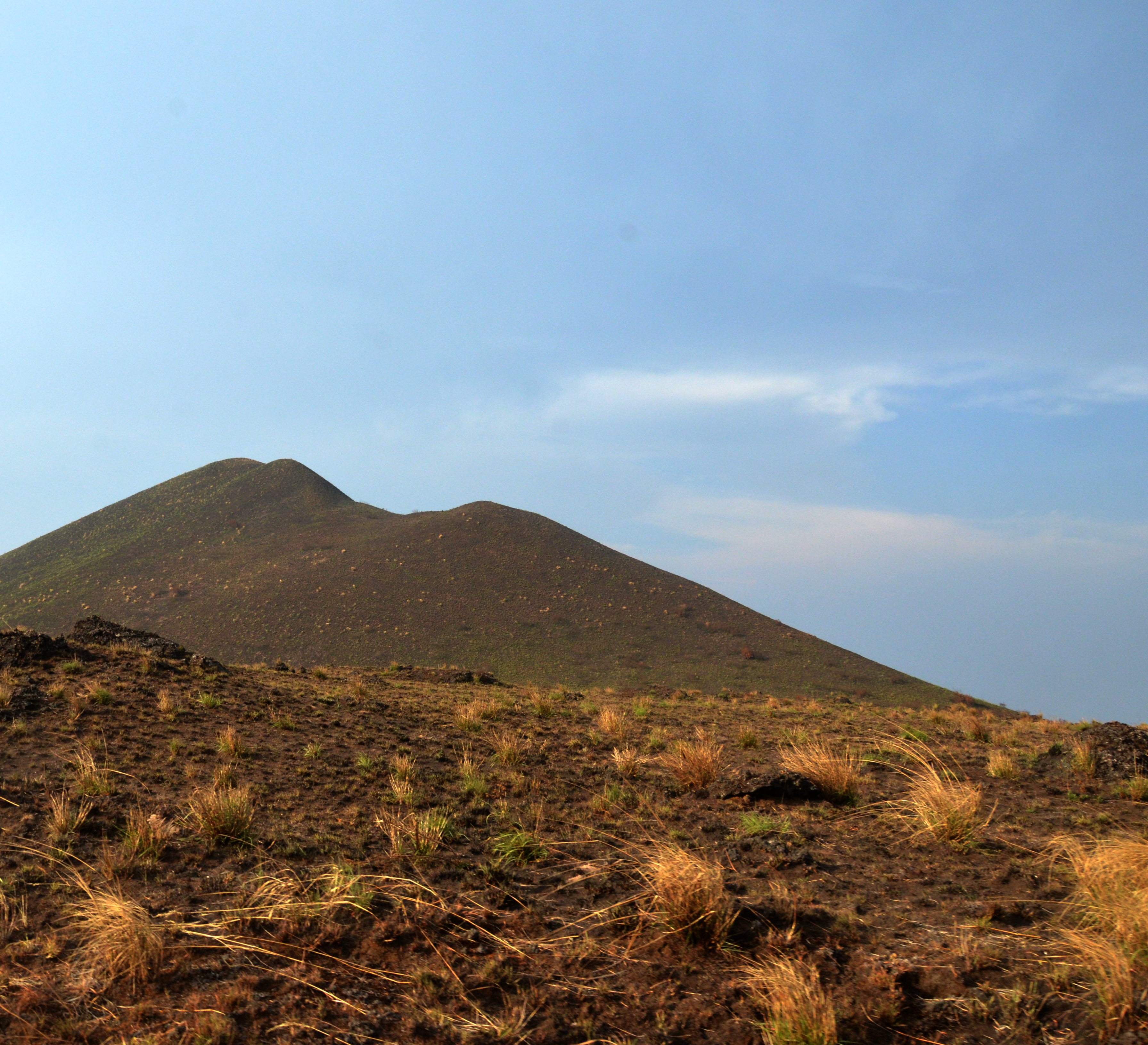 Au sommet du Mont Cameroun